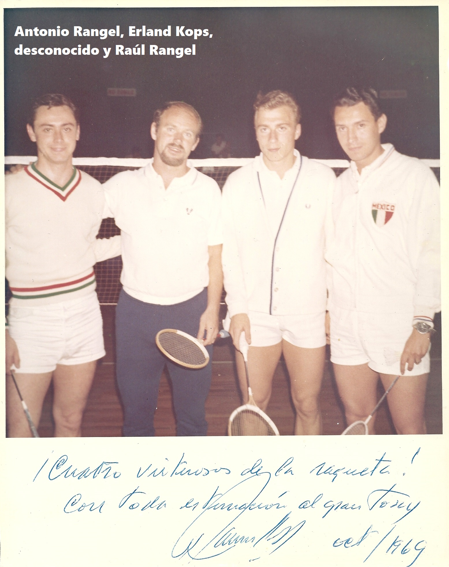 Foto tomada en el Campeonato Nacional Abierto de México en 1969, aparecen de izquierda a derecha: Antonio Rangel Ojeda, Erland Kops, un badmintonista no reconocido y Raúl Rangel Ojeda.